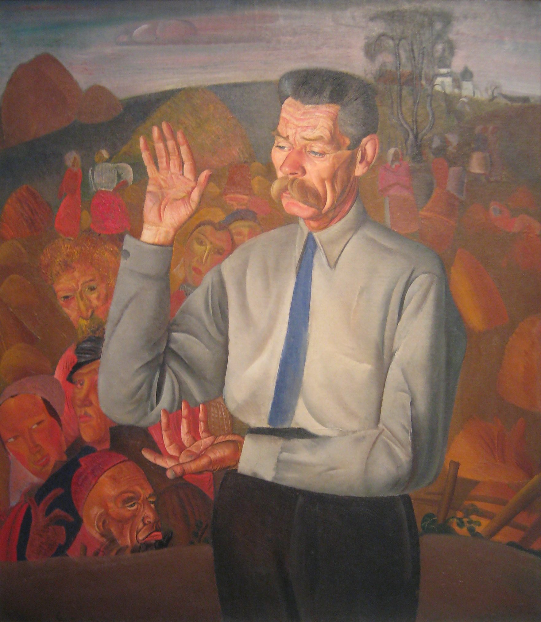 Максим Горький